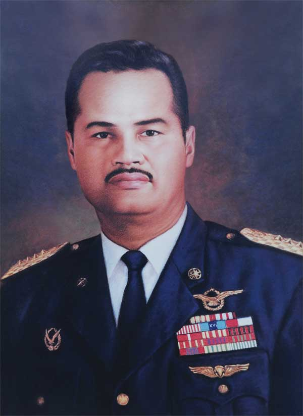 Marsekal TNI Rusmin Nurjadin. Kepala Staf TNI Angkatan Udara